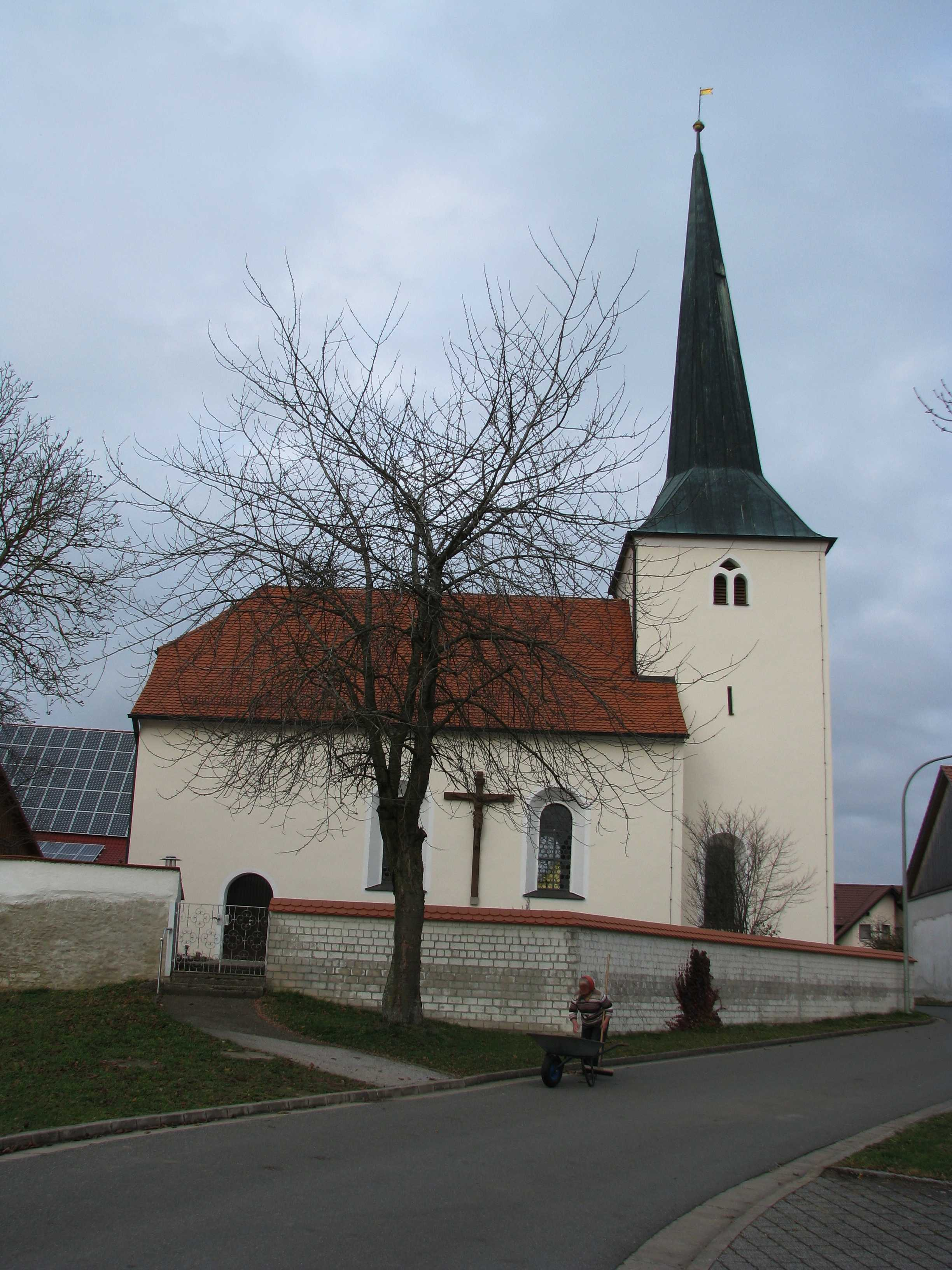 Thundorf, Gemeindeteil von Freystadt im Landkreis Neumarkt in der Oberpfalz (Bayern)